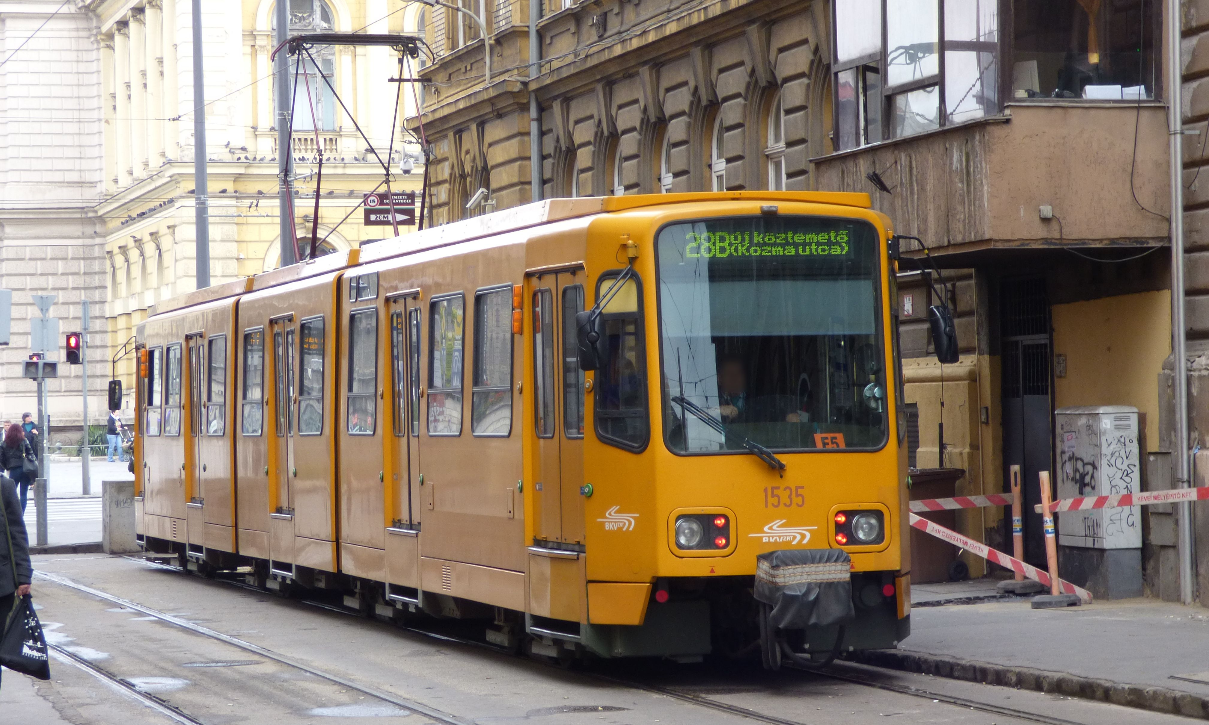 A 1535-ös pályaszámú TW6000-es villamos a 28B járat Keleti pályaudvar végállomásán